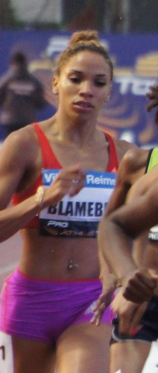 800 mètres féminin lors des Rencontres d'athlétisme de Reims 2013 :Lisa Blameble